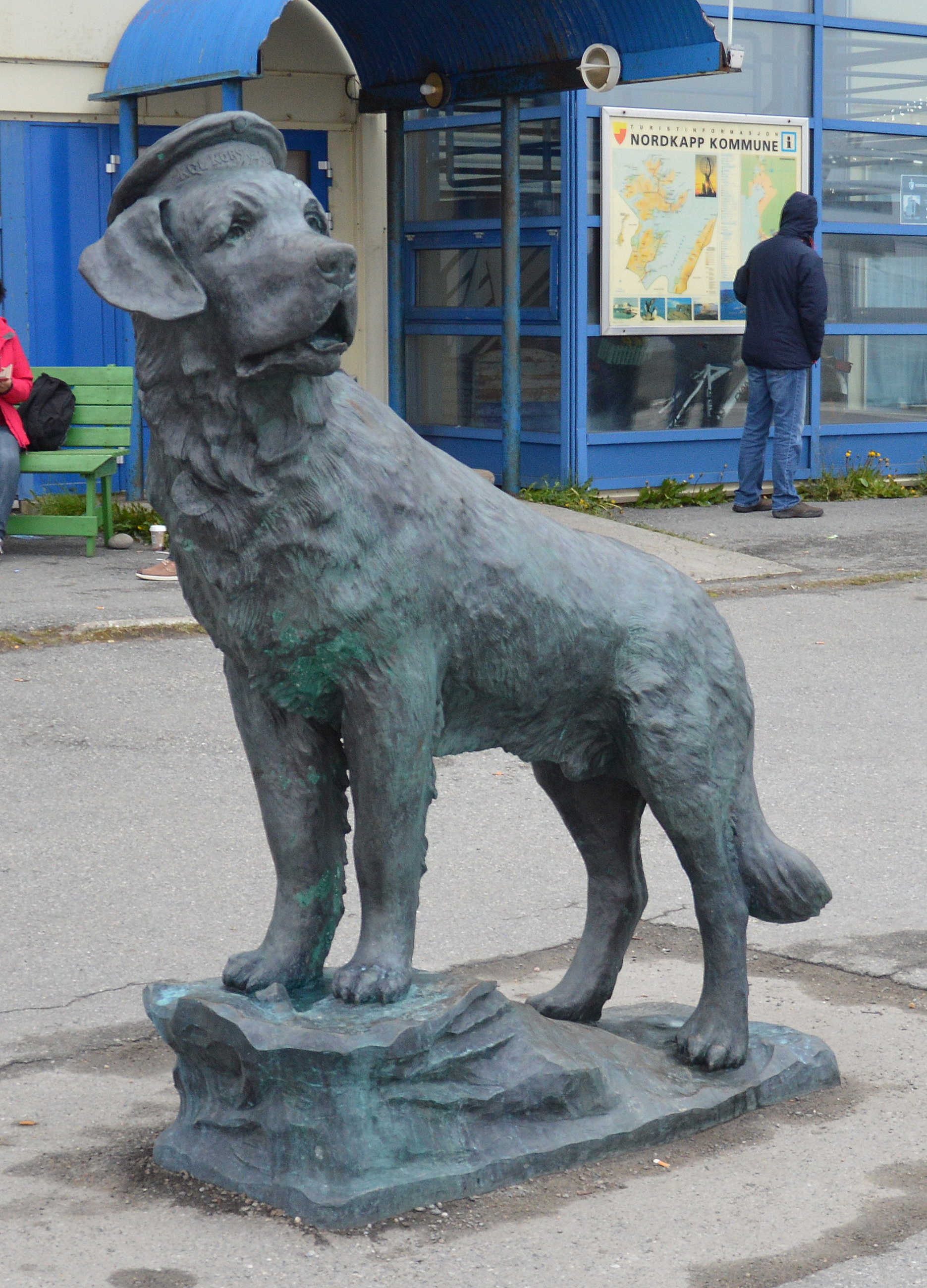 Bamsestatue Honningsvag